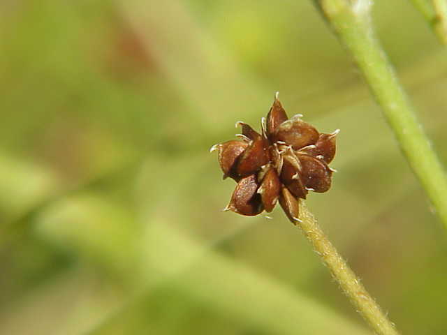 Species: Ranunculus acris Family: Ranunculaceae Image No. 1